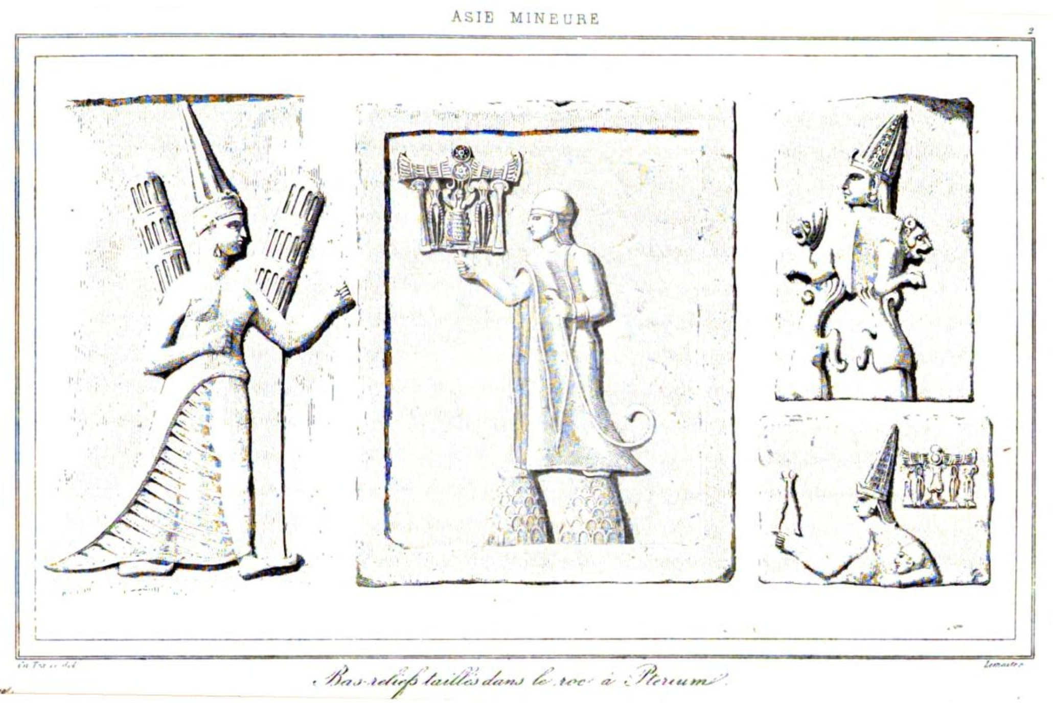 Reliefs aus dem hethitischen Heiligtum von Yazilikaya bei Hattusa, Zentraltürkei, Zeichnung von Charles Texier